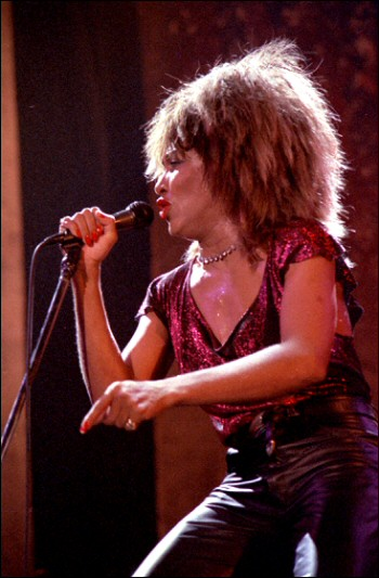 Tina Turner, Drammenshallen, Norway